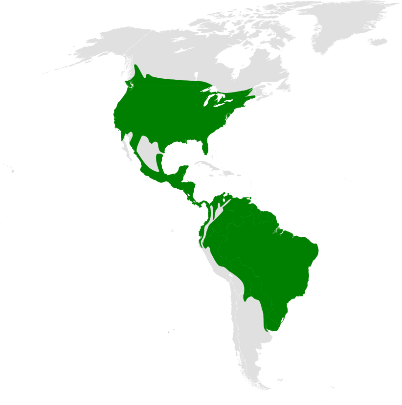 Stelgidopteryx distribution map